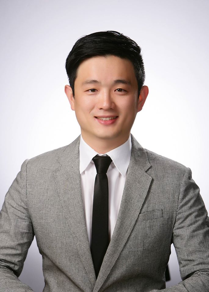 서울특별시 강남구시의회 의원 여선웅. evidence of permission from the author